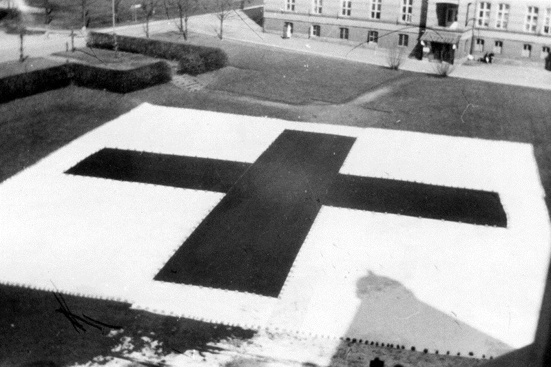 Steen og Strøm sydde flagget natt til 10. april 1940. Her er det utlagt i sykehusparken, i forkant av fryktet bombing av Oslo.